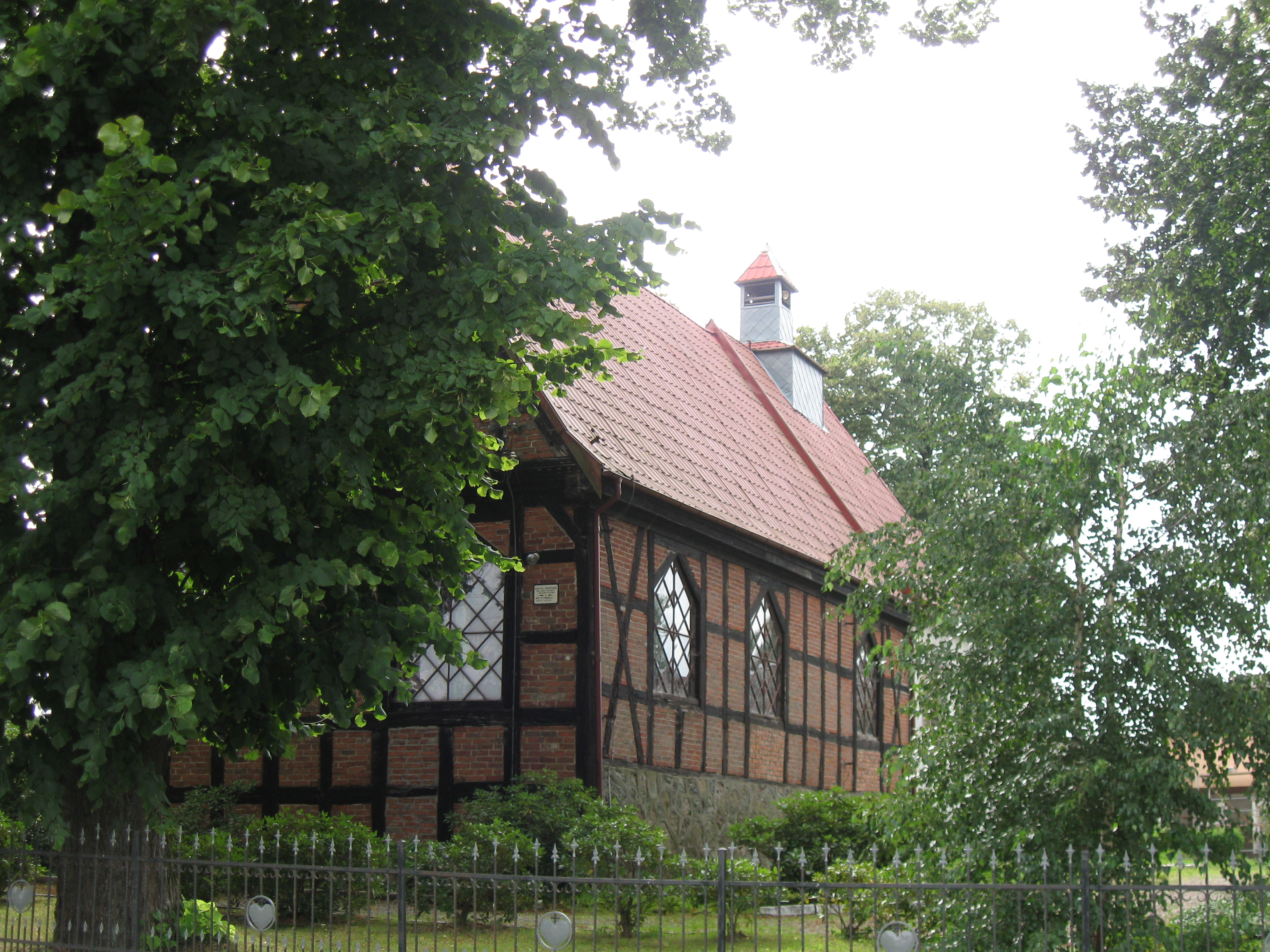 Kościół parafialny pw. Matki Boskiej Królowej Polski w Gorawinie (widok od wschodu)